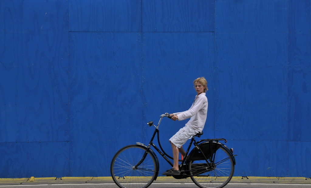 Opoe fiets